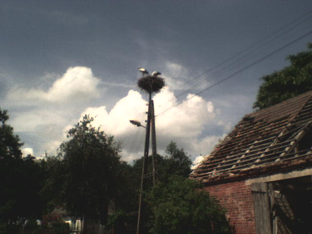 Sikorki, Zachodniopomorskie